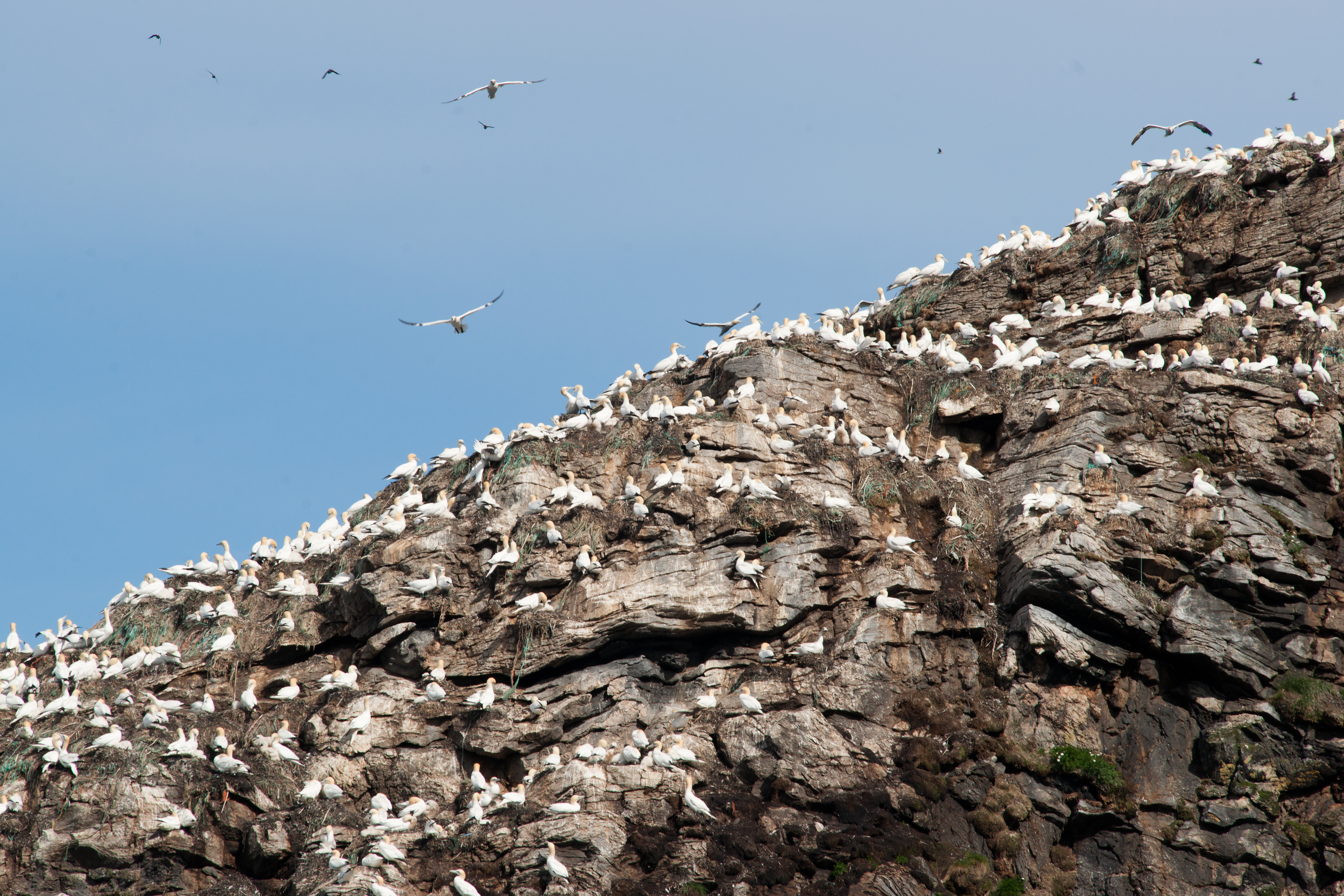 Gjesværstappan natural reserve, Finnmark, Norway. Gannets.